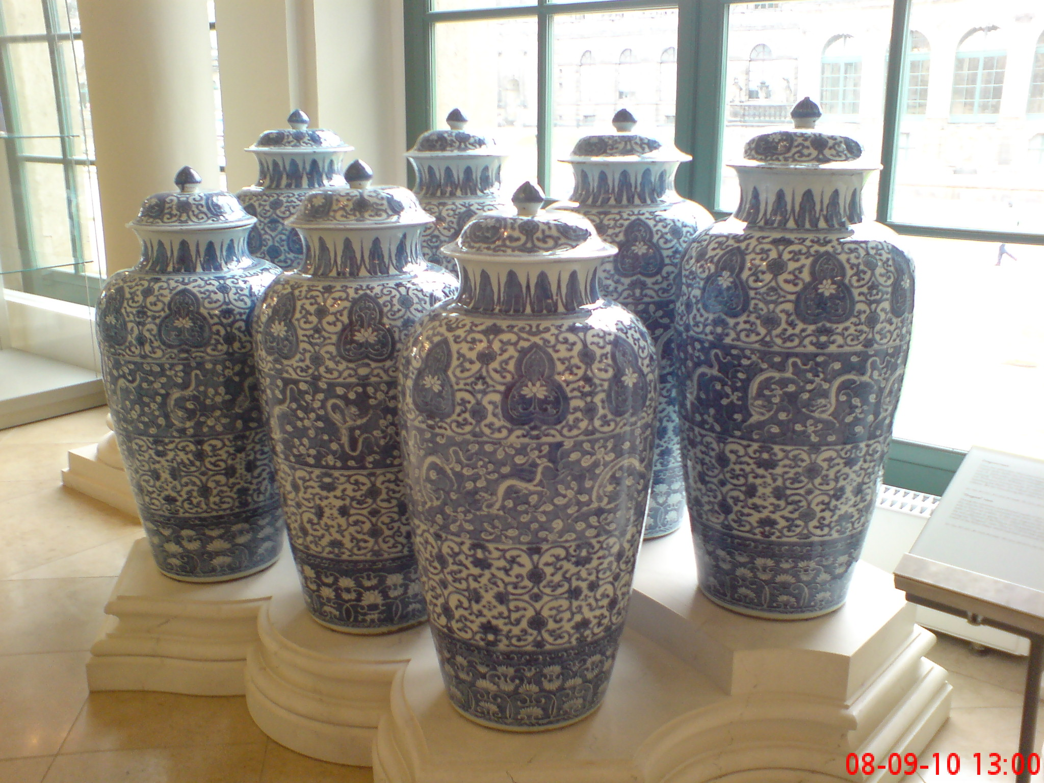 Wazy Dragońskie